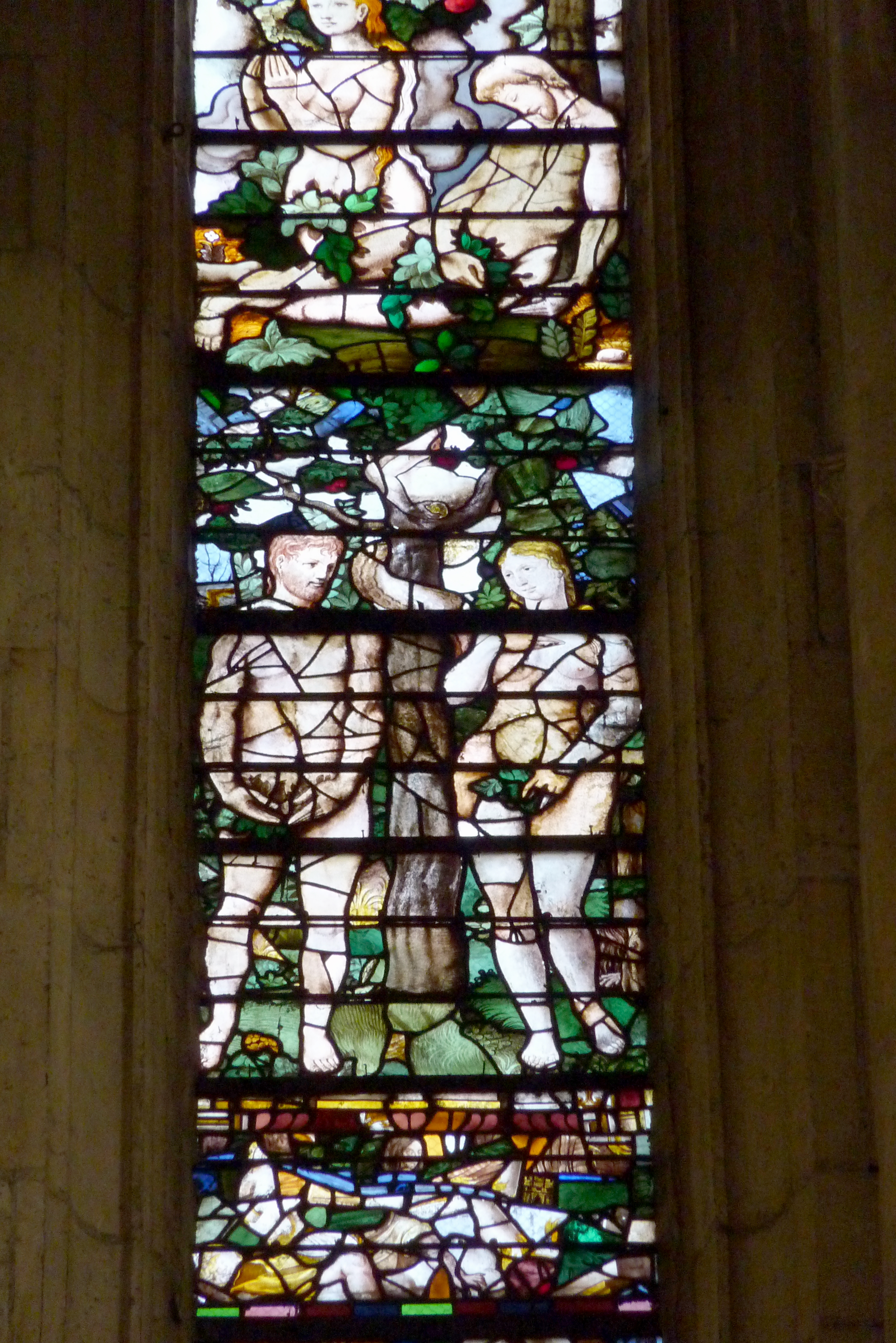 Katholische Pfarrkirche Saint-Aspais in Melun im Département Seine-et-Marne in der Region Île-de-France (Frankreich), Bleiglasfenster im Chor aus dem 16. Jahrhundert, Darstellung: Adam und Eva im Paradies, Sündenfall